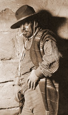 Михаил Вавич, один из популярнейших русских певцов (бас, баритон) начала ХХ века (оперетта и романс) в роли злодея (ковбой, актёр второго плана)